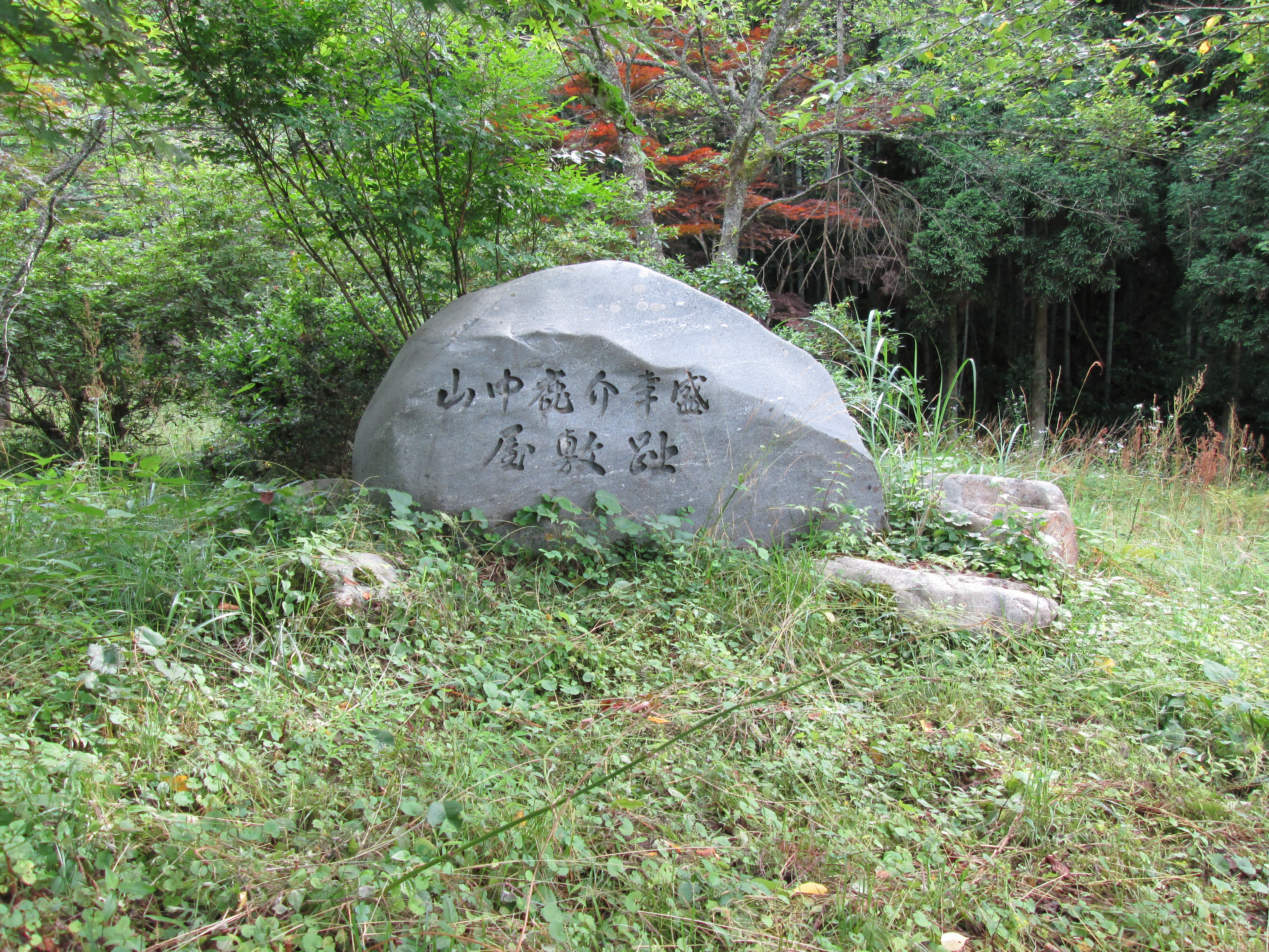 安来市広瀬町にある山中幸盛が誕生したとされる屋敷跡。